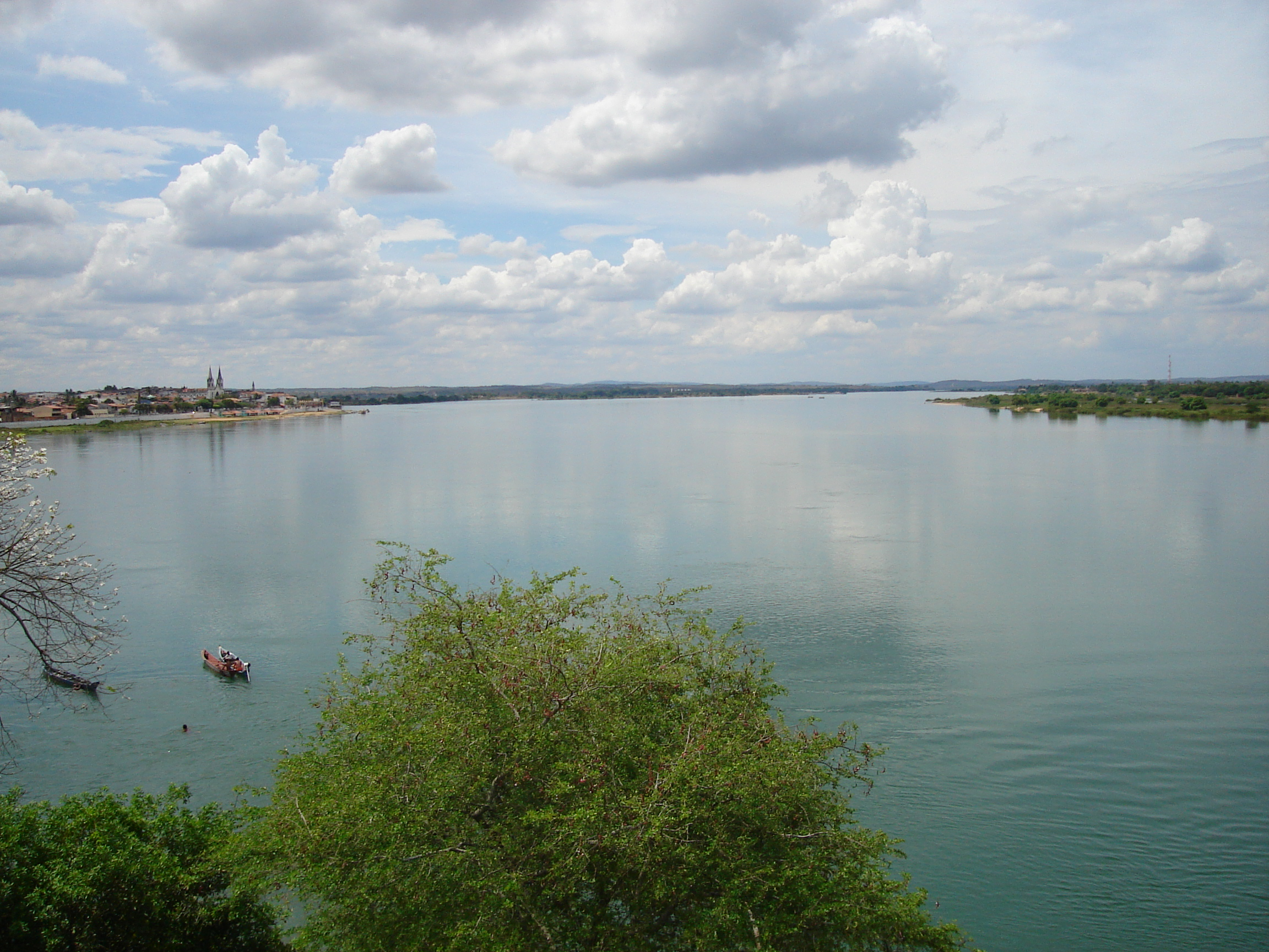 Rio São Francisco, close to Propriá, december 2005.